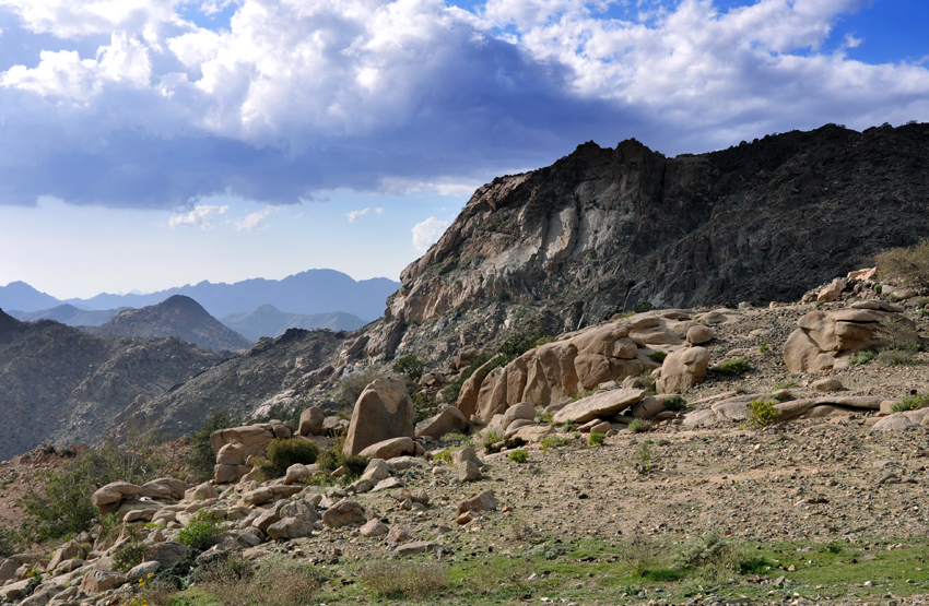 منظر طبيعي من قرية الصفاه بمحافظة ميسان غرب المملكة العربية السعودية